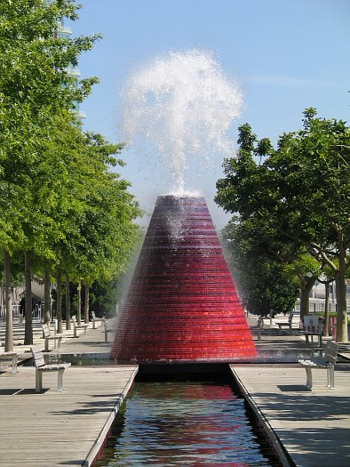 Parque das Nações. Lisboa (Lisbon), Portugal.